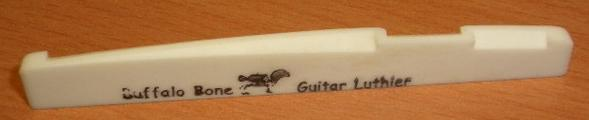 木吉他下弦枕